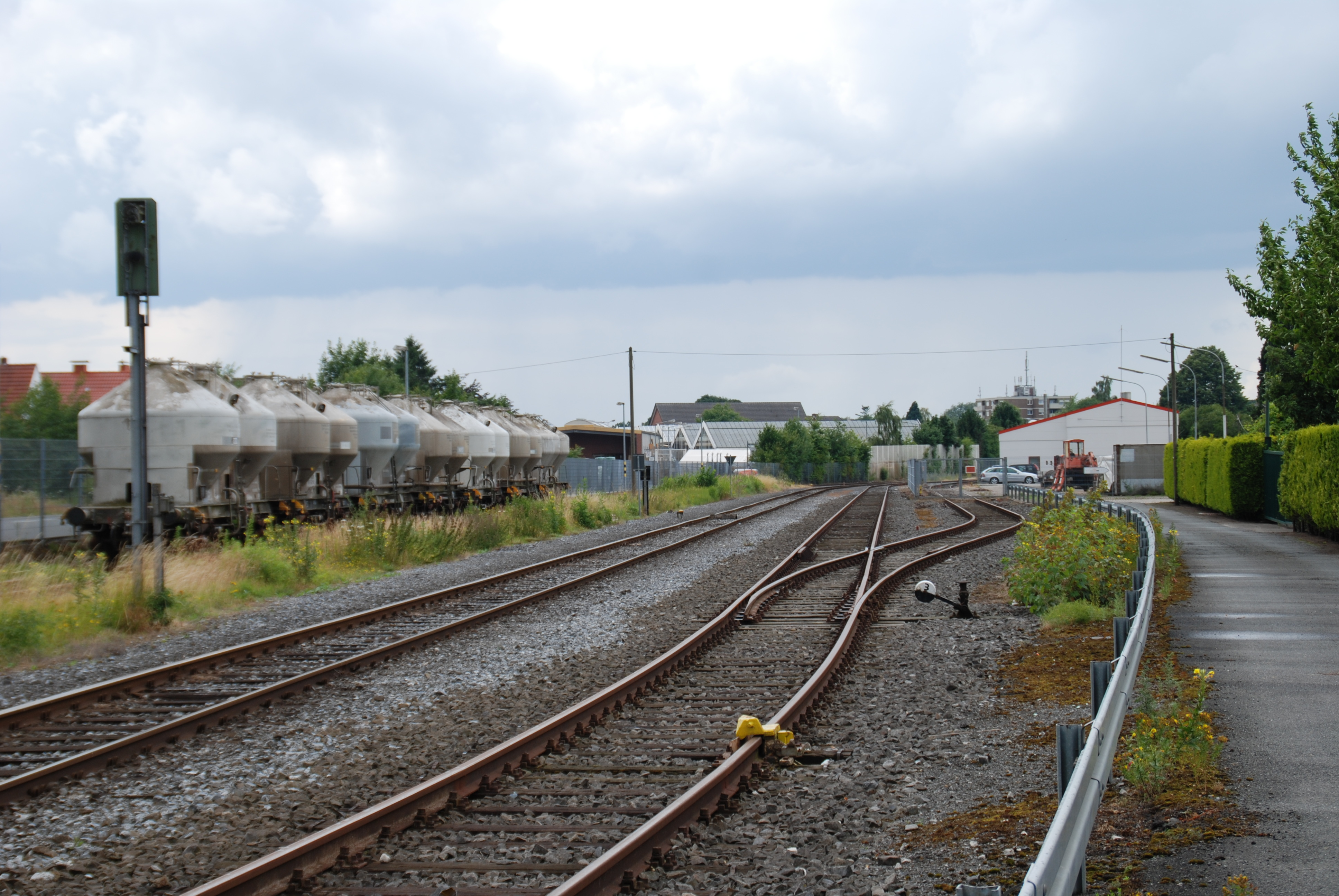 Betriebsstelle Stadtberg der TNB. Links der ehemalige Gleistumpf zur Ibbenbürener Straße darauf abgestellt Silowagen der Bentheimer Eisenbahn.